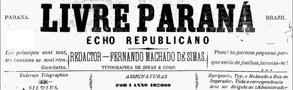 Primeira página do jornal (extinto) Livre Paraná